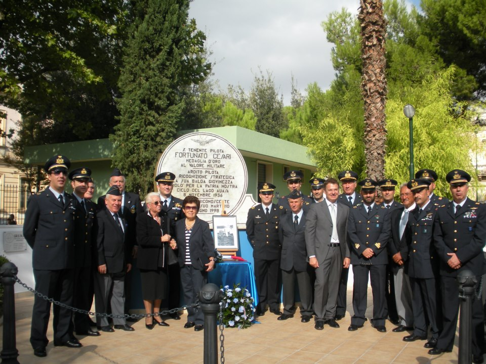 Domenica 21 ottobre 2013 - inaugurazione della lapide commemorativa intitolata al S.Ten Pilota M.O.V.M. Fortunato Cesari - p.zza F. Cesari - Galatina